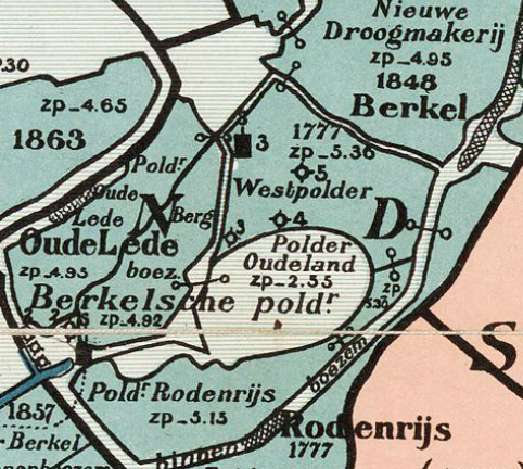 Westpolder